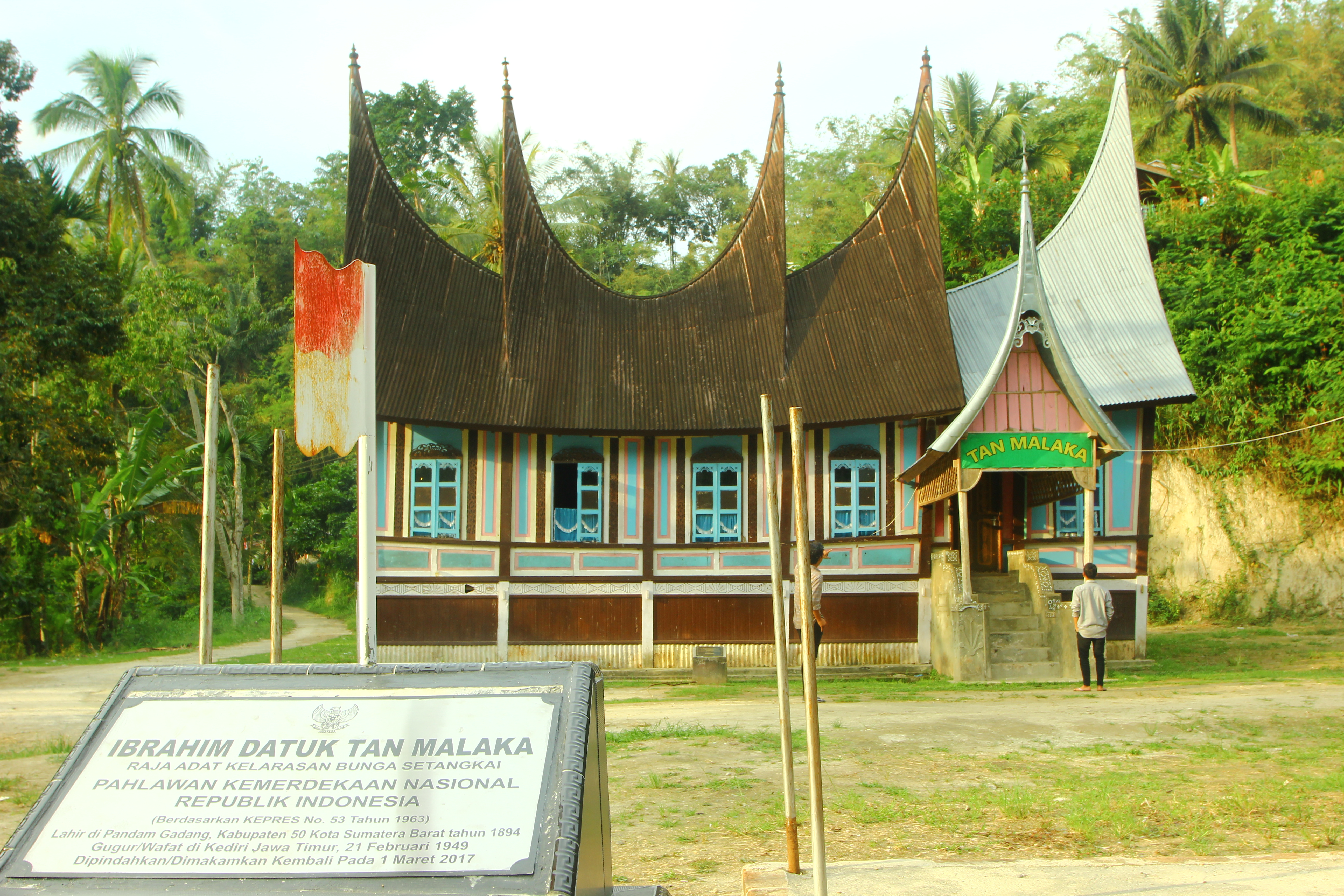 Rumah Kelahiran Tan Malaka di Nagari Pandam Gadang